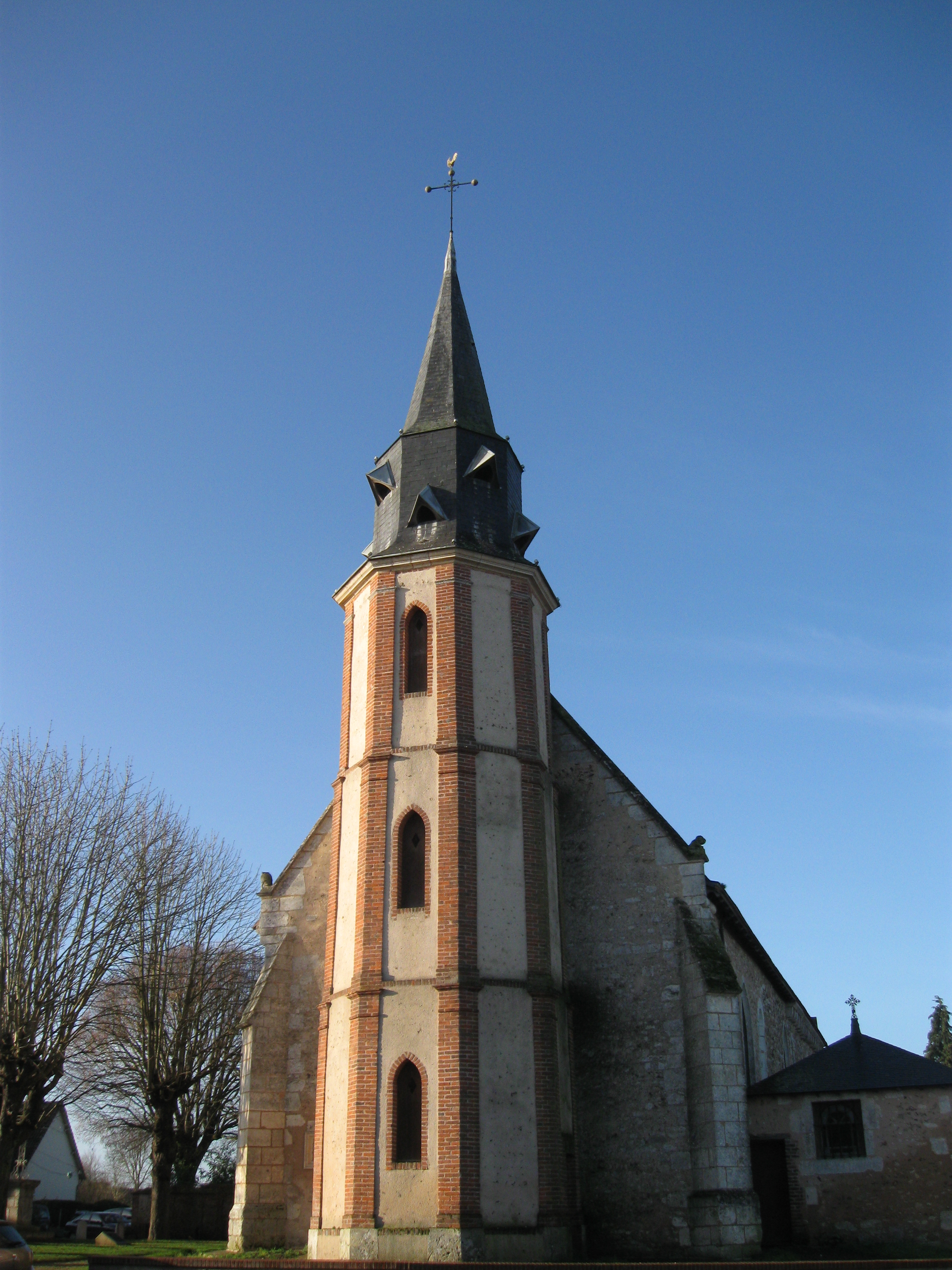 Eglise de Saint-Mamès à Donnemain